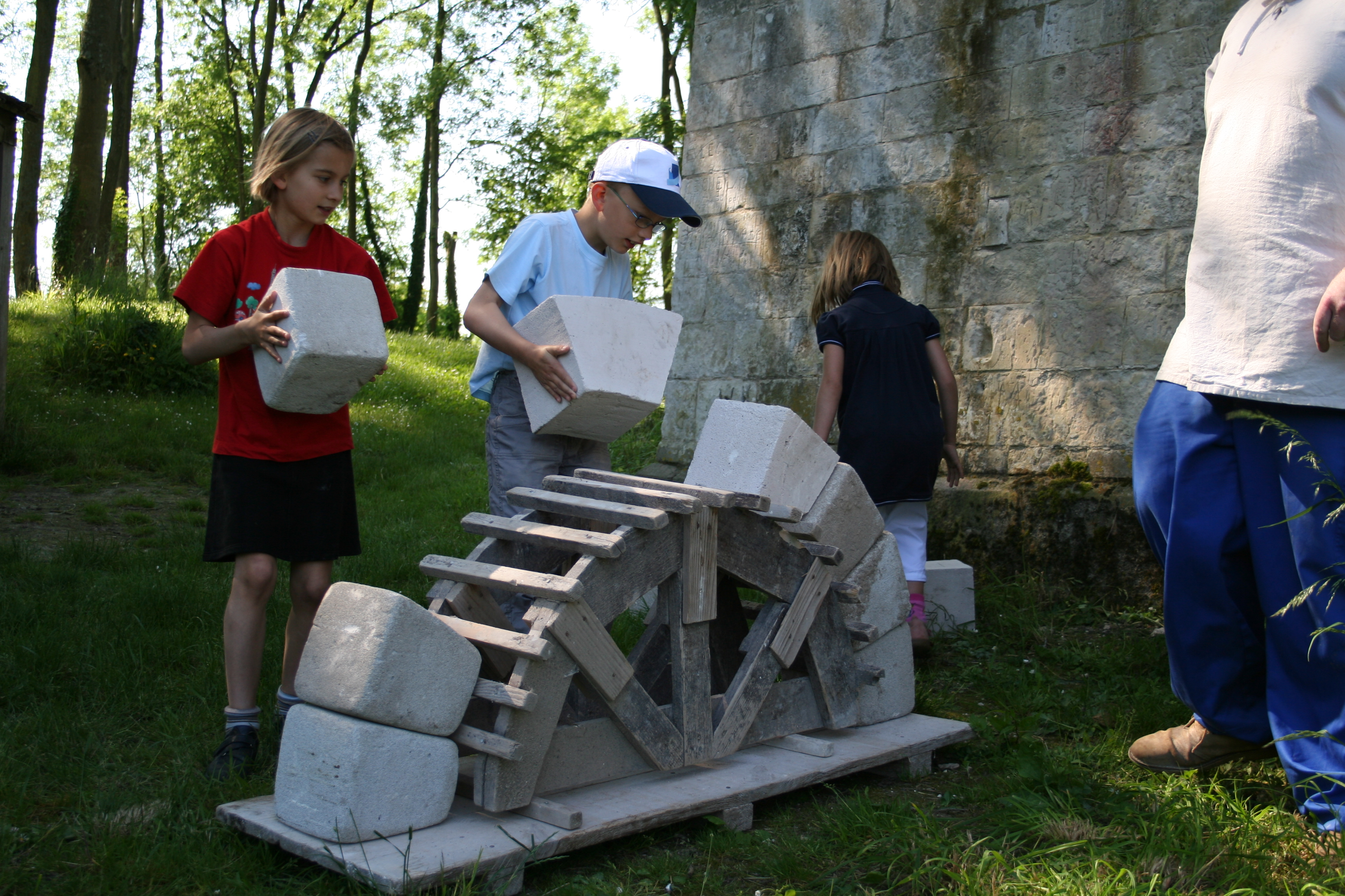 La visite au château d'Eaucourt sur Somme permet de découvrir par le geste les savoir-faire des bâtisseurs de château et de cathédrale